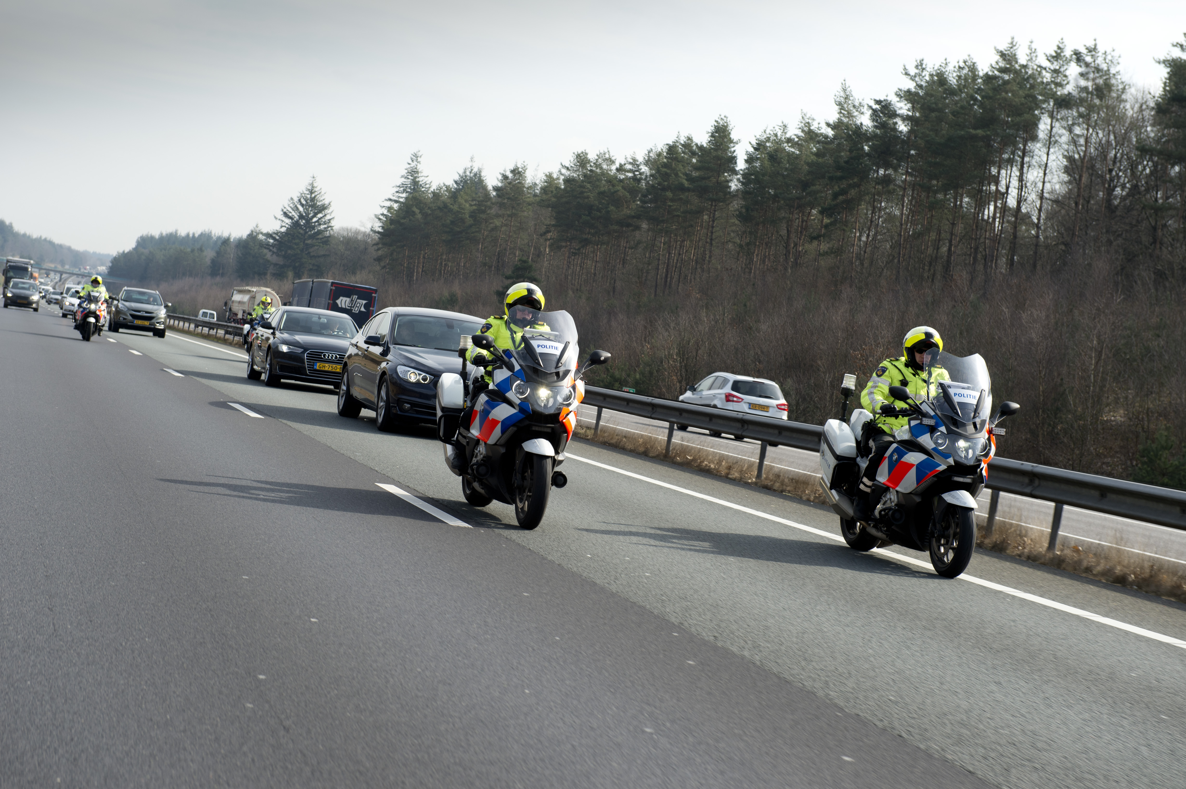 Een Verkeerstechnische Begeleiding van een VIP op de A1.